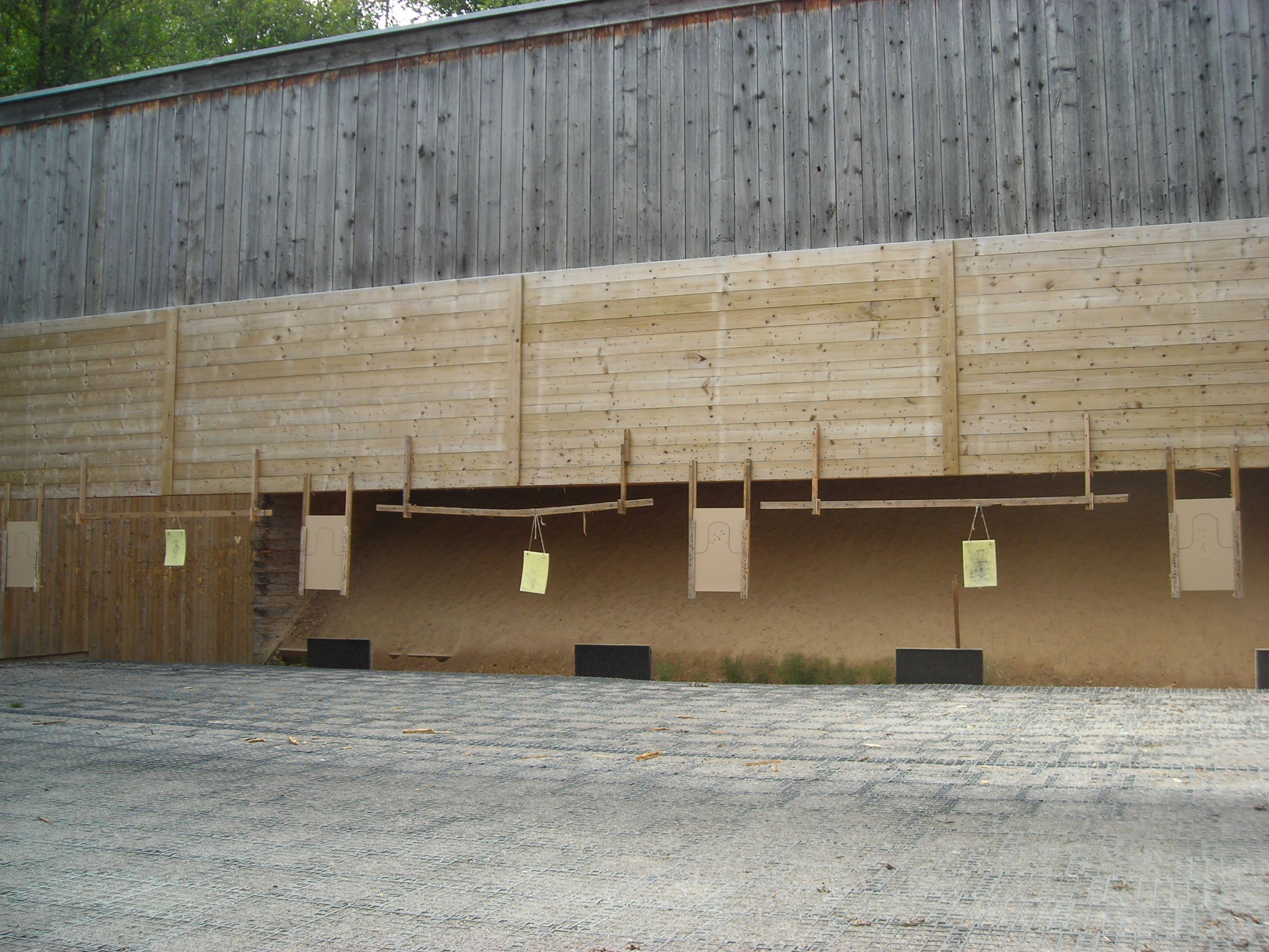 Outdoor Shooting Range at Perlacher Forst, München (used by the local Police, formerly used by the Bundeswehr).